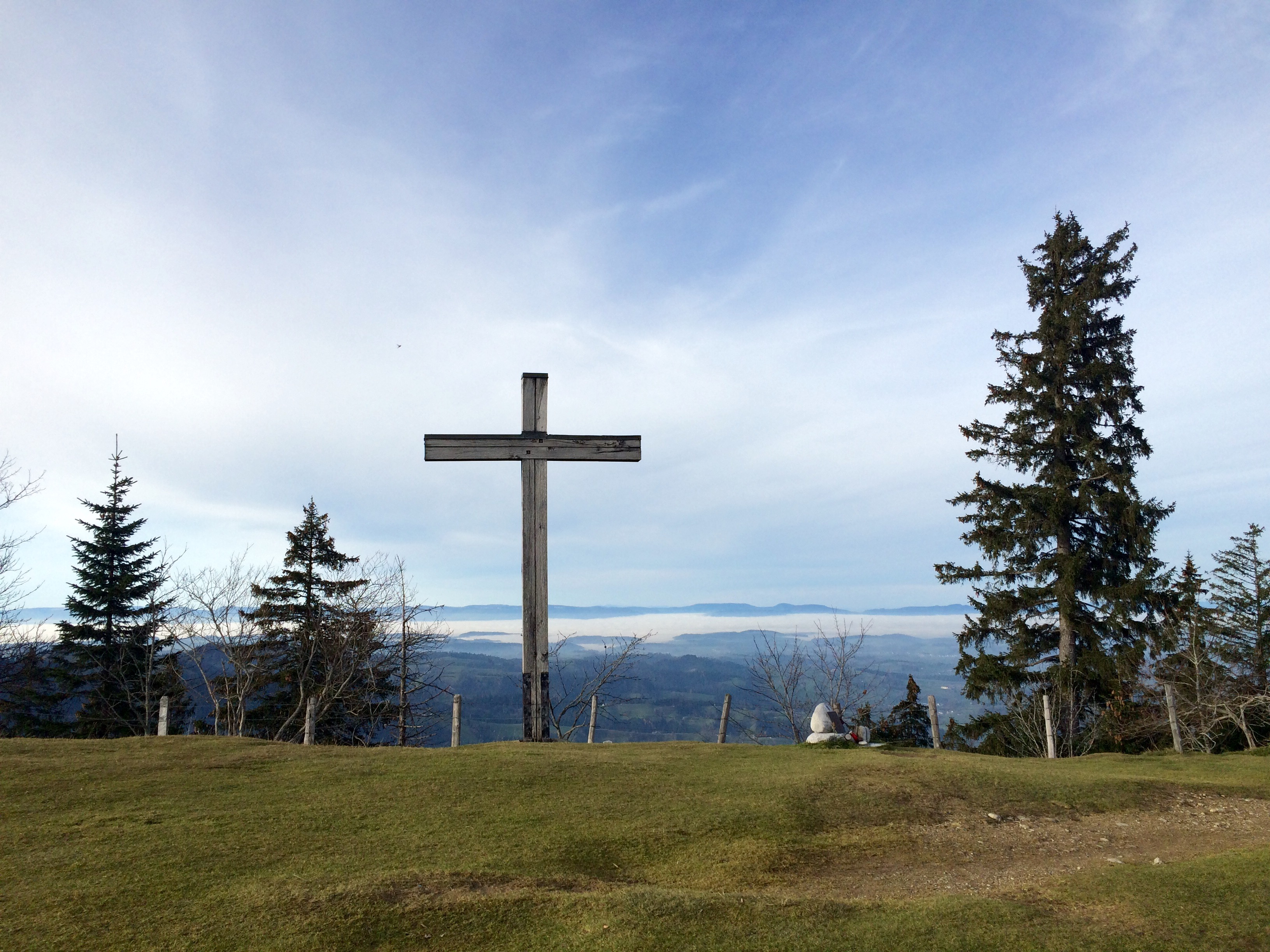 Im Hintergrund ein Ausblick nach Norden ins Schweizer Mittelland (teilweise in Nebel gehüllt) und dem Jura.